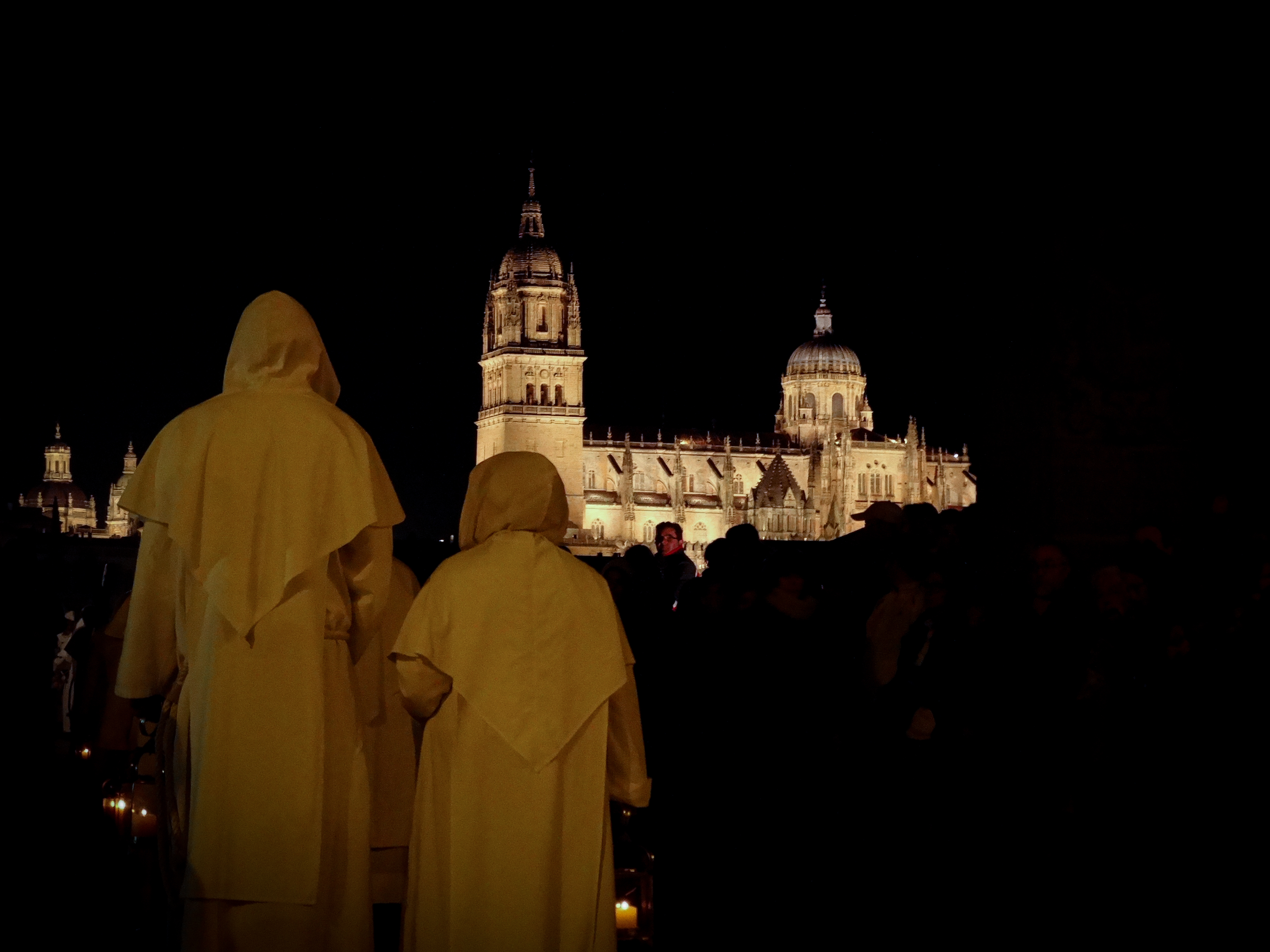 Hermandad del Cristo del Amor y de la Paz